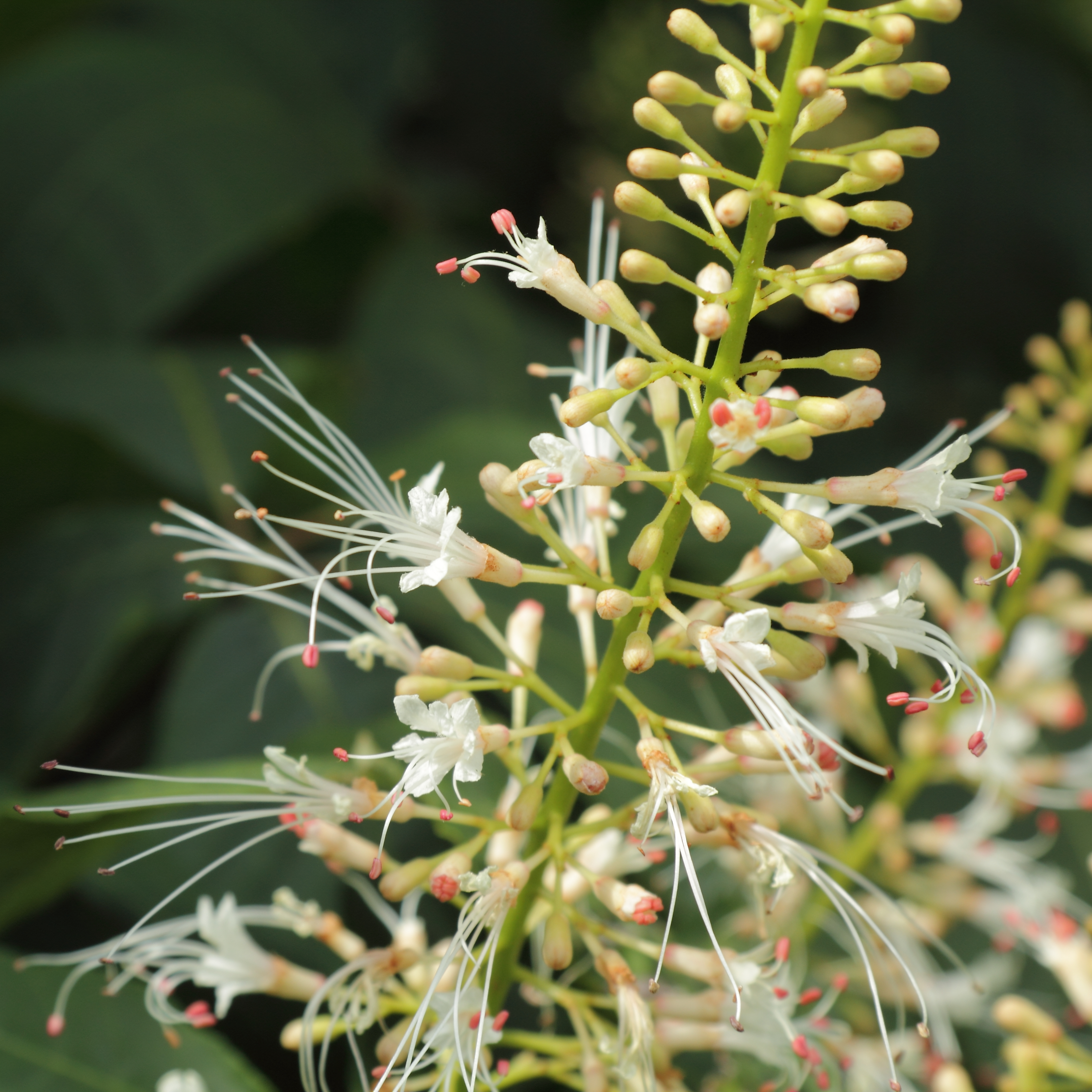 Aesculus parviflora, identifierad med hjälp av befintlig skylt vid Kew Gardens, London.